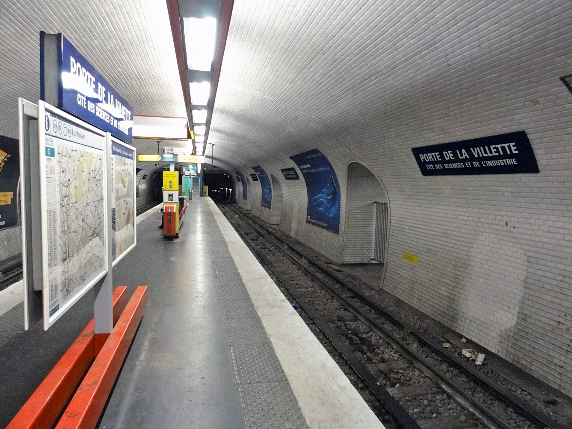 Station Porte de la Villette de la ligne 7 du métro de Paris, France.